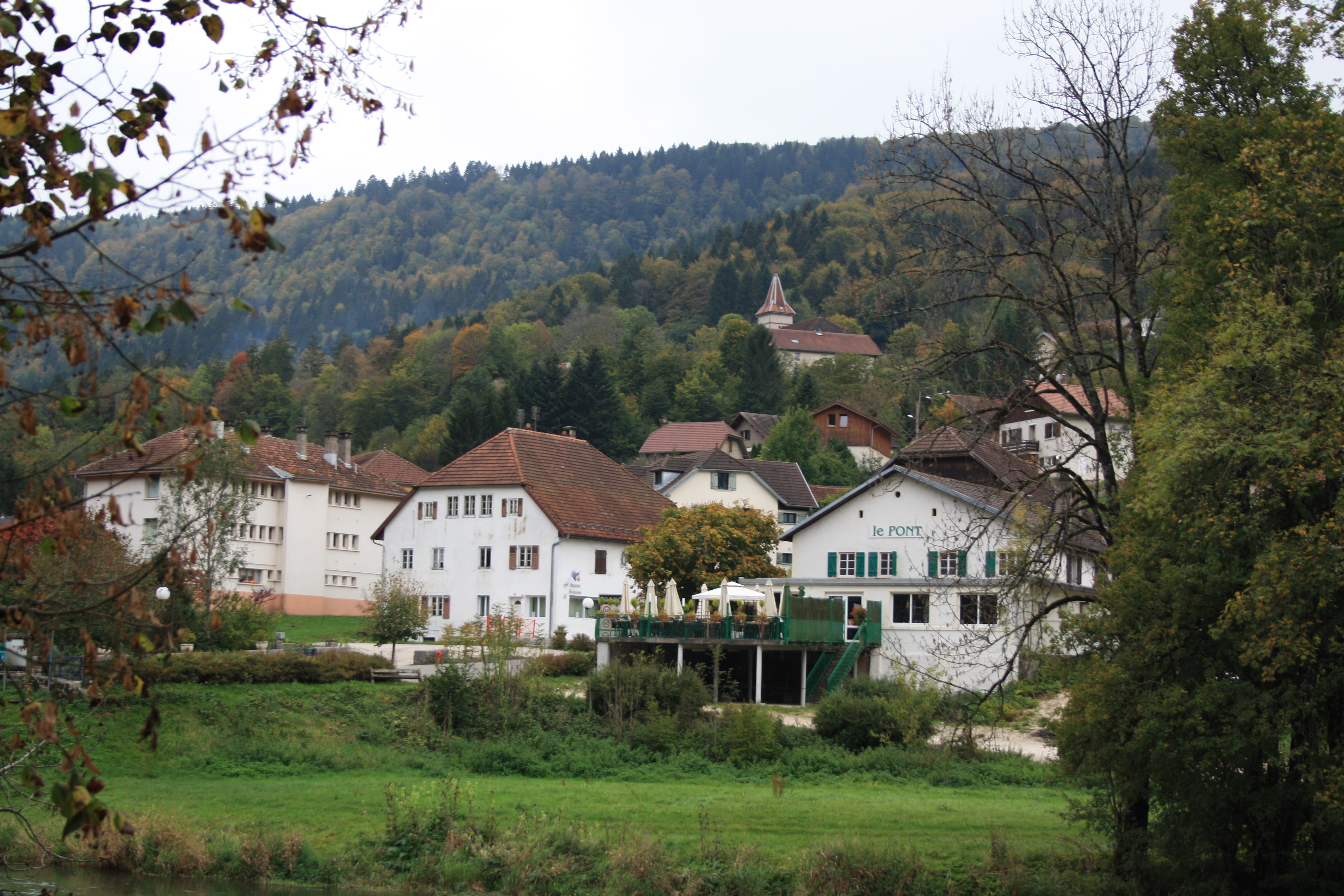 Goumois